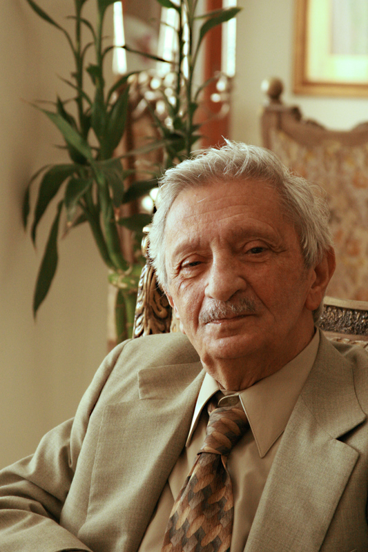 شاعر ، ترانه سرا Poet, Song writer